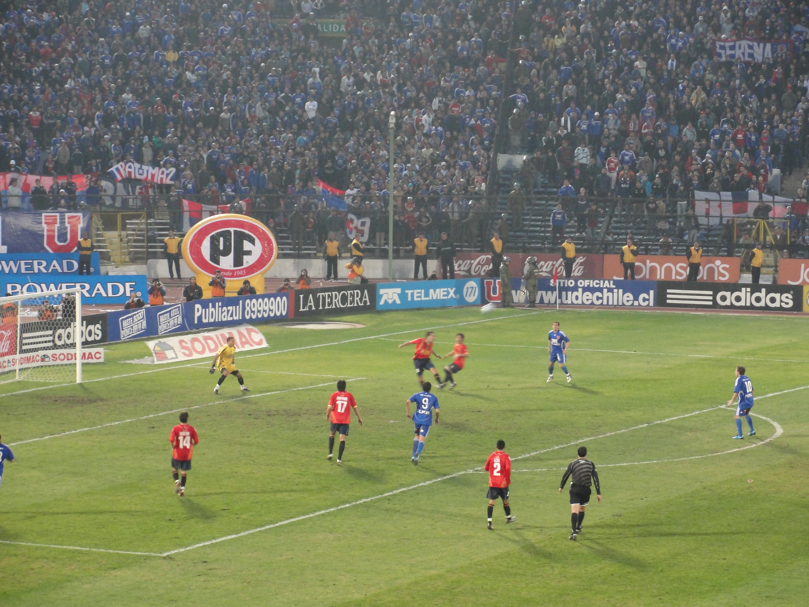 Defensa de Unión Española despejando el balón desde el área. Partido de ida – Final del Torneo de Apertura 2009 Universidad de Chile vs. Unión Española Estadio Nacional Julio Martínez Pradanos.